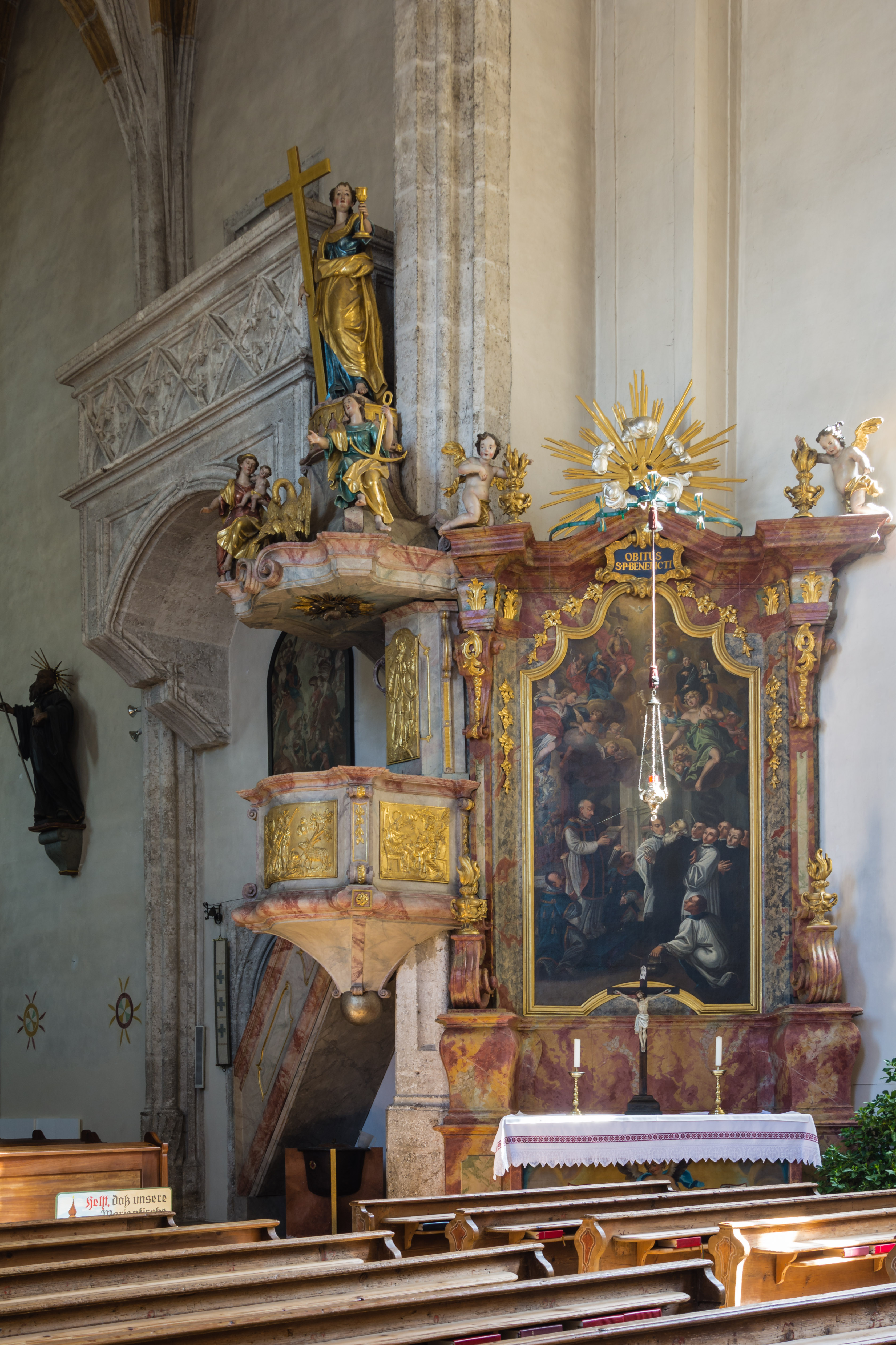 Kath. Pfarrkirche, Wallfahrtskirche Sieben Schmerzen Mariä, die Kanzel und der rechte Seitenaltar